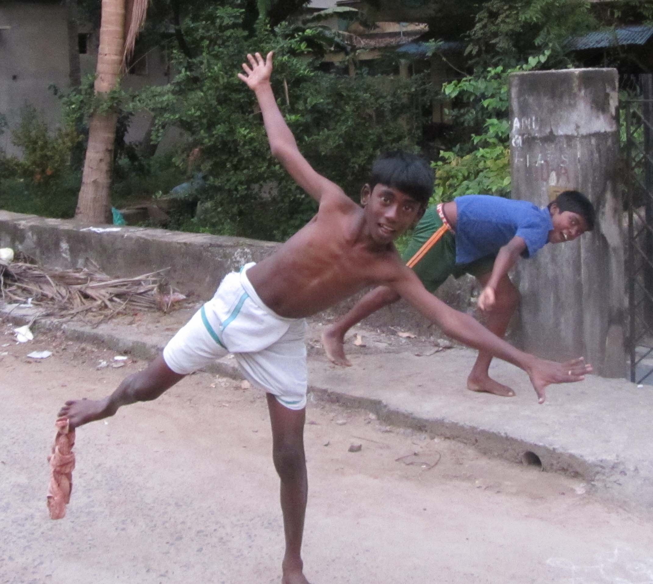 own creation - ஆனமானத்திரி, கரணப்பந்து ஆகிய விளையாட்டுகளின் முதல் படி